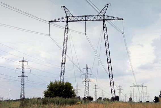 Липецкая область, линии электропередачи (ЛЭП)